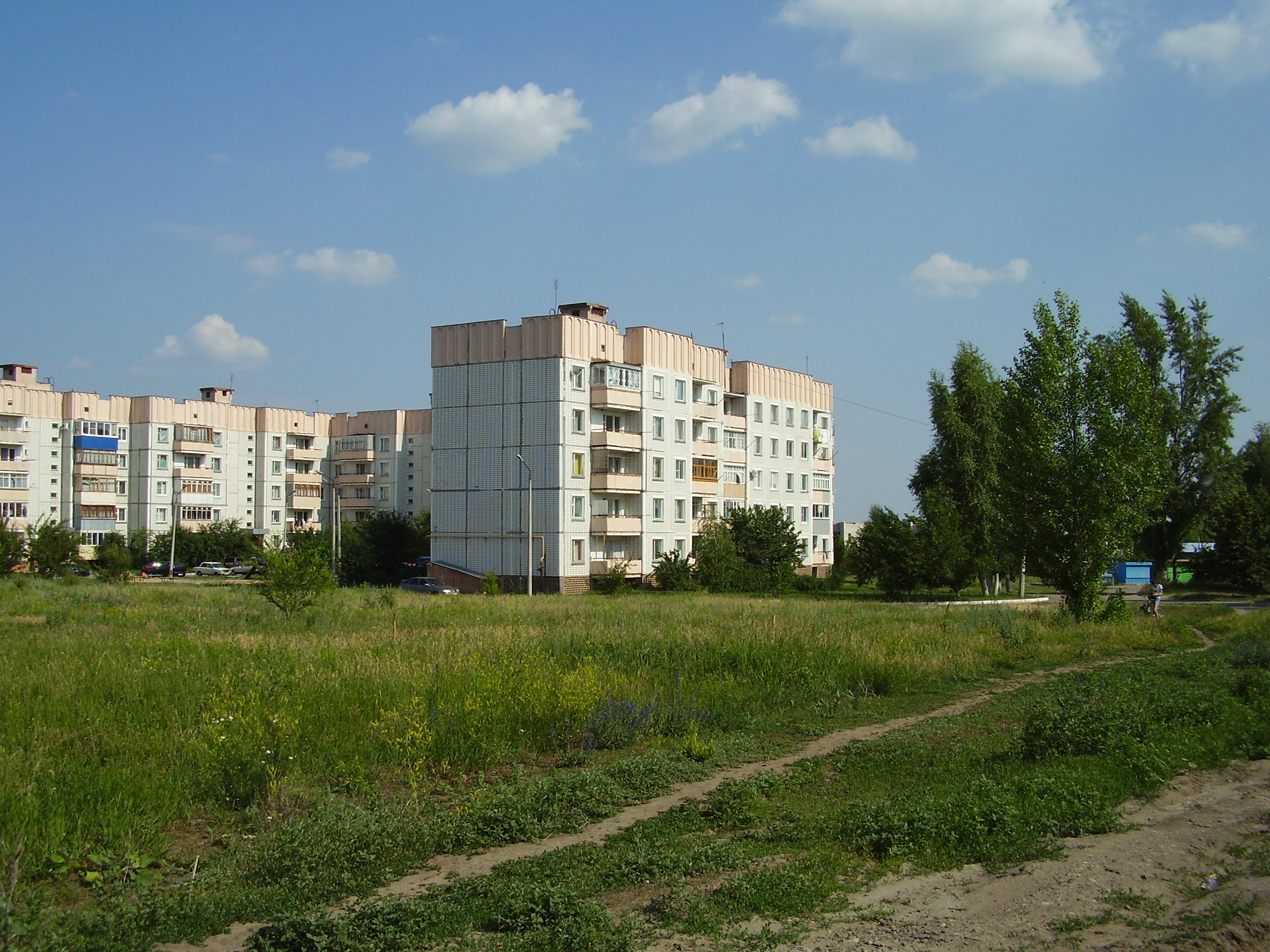 Северный район в Острогожске